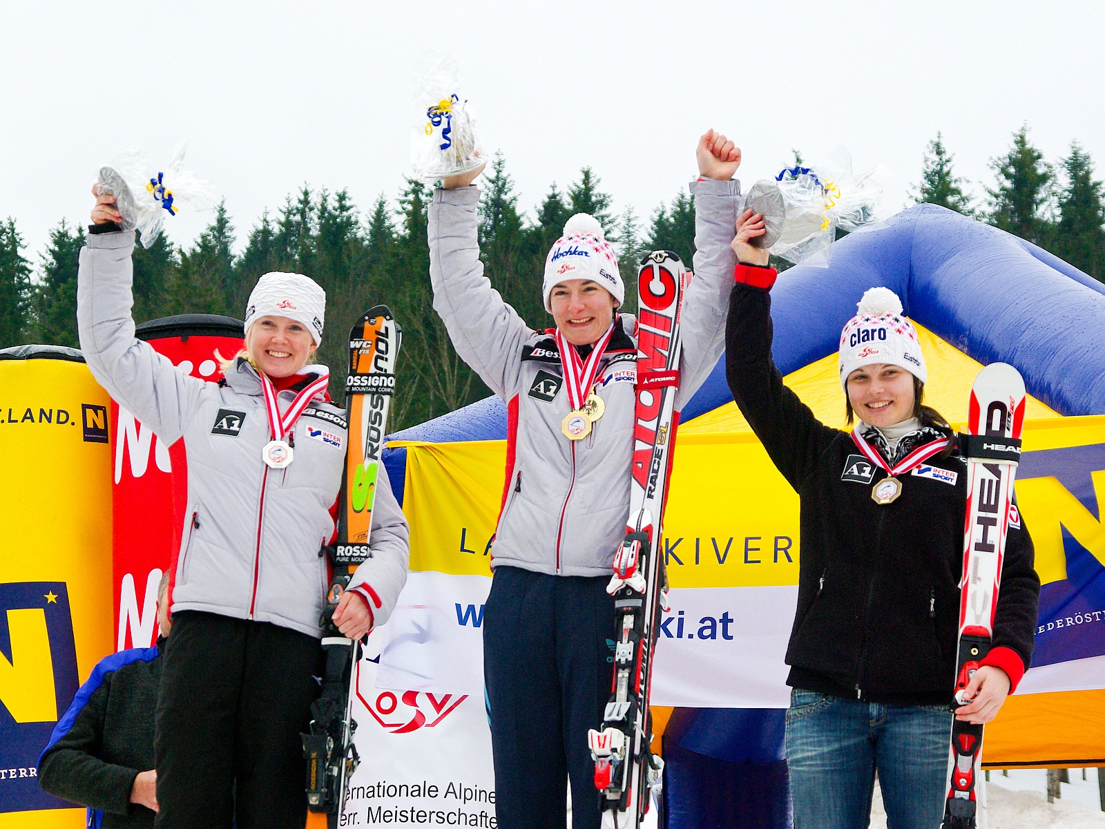 Die Siegerinnen des Slaloms der Österreichischen Alpinen Skimeisterschaften 2009: 1. Platz: Kathrin Zettel (mitte), 2. Platz: Alexandra Daum (links), 3. Platz: Anna Veith (rechts)